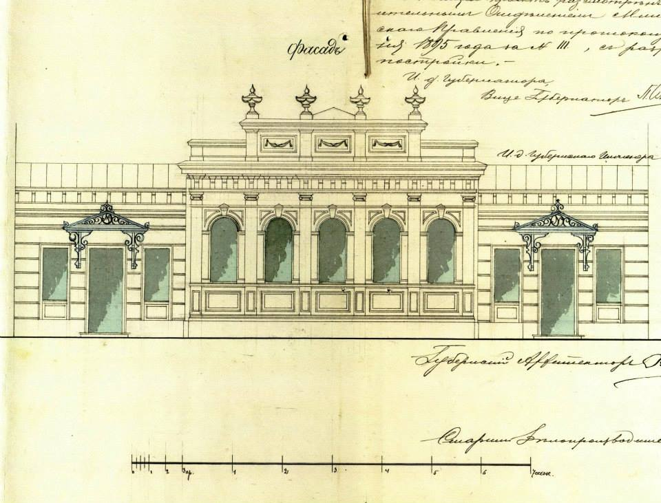 Беларуская (тарашкевіца): Менск (Miensk), вуліца Ракаўская (vulica Rakaŭskaja), 17. Дом для жыдоўскіх вясельляў.